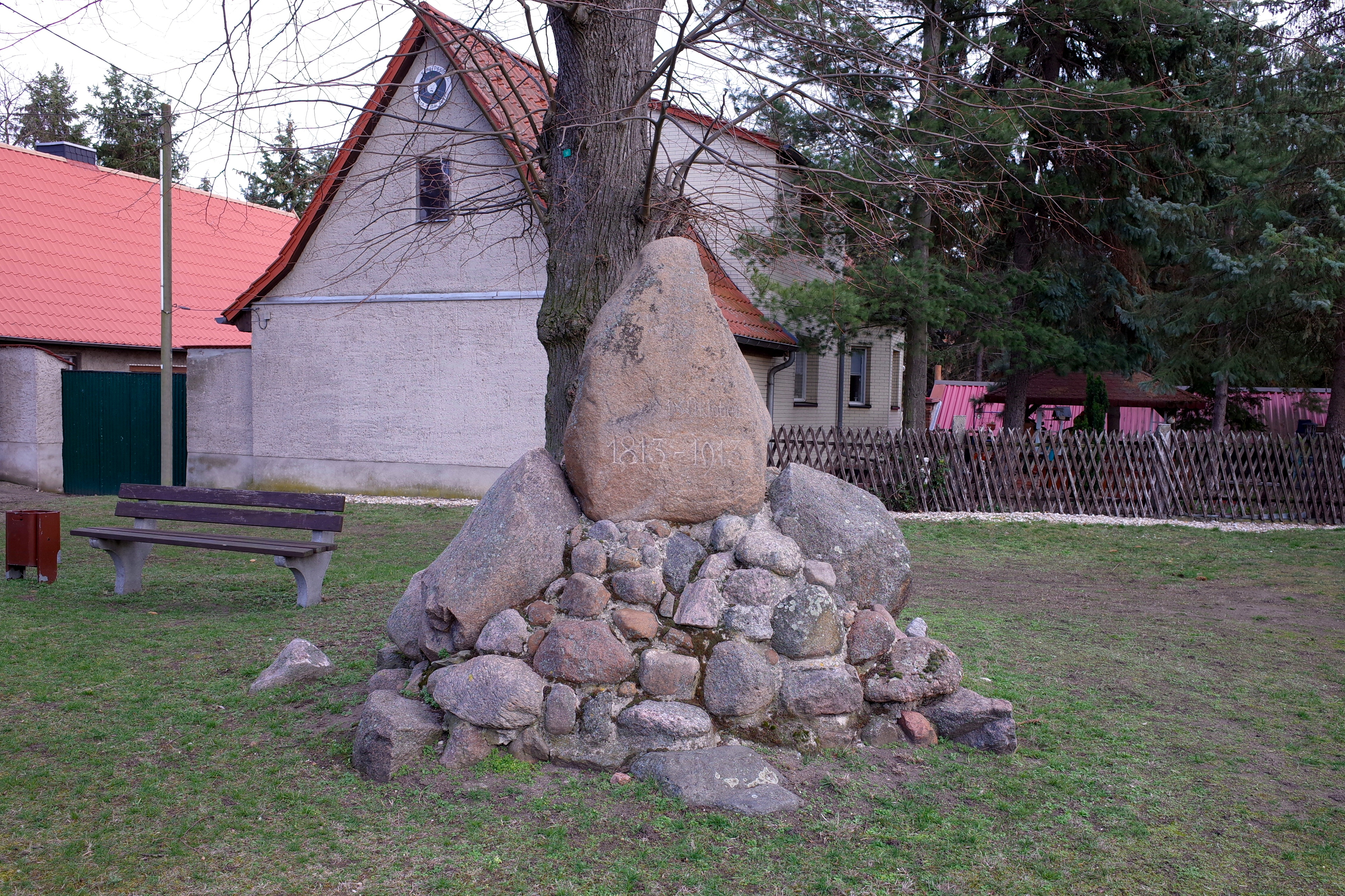 Köthen (Anhalt), Denkmal im Ortsteil Hohsdorf